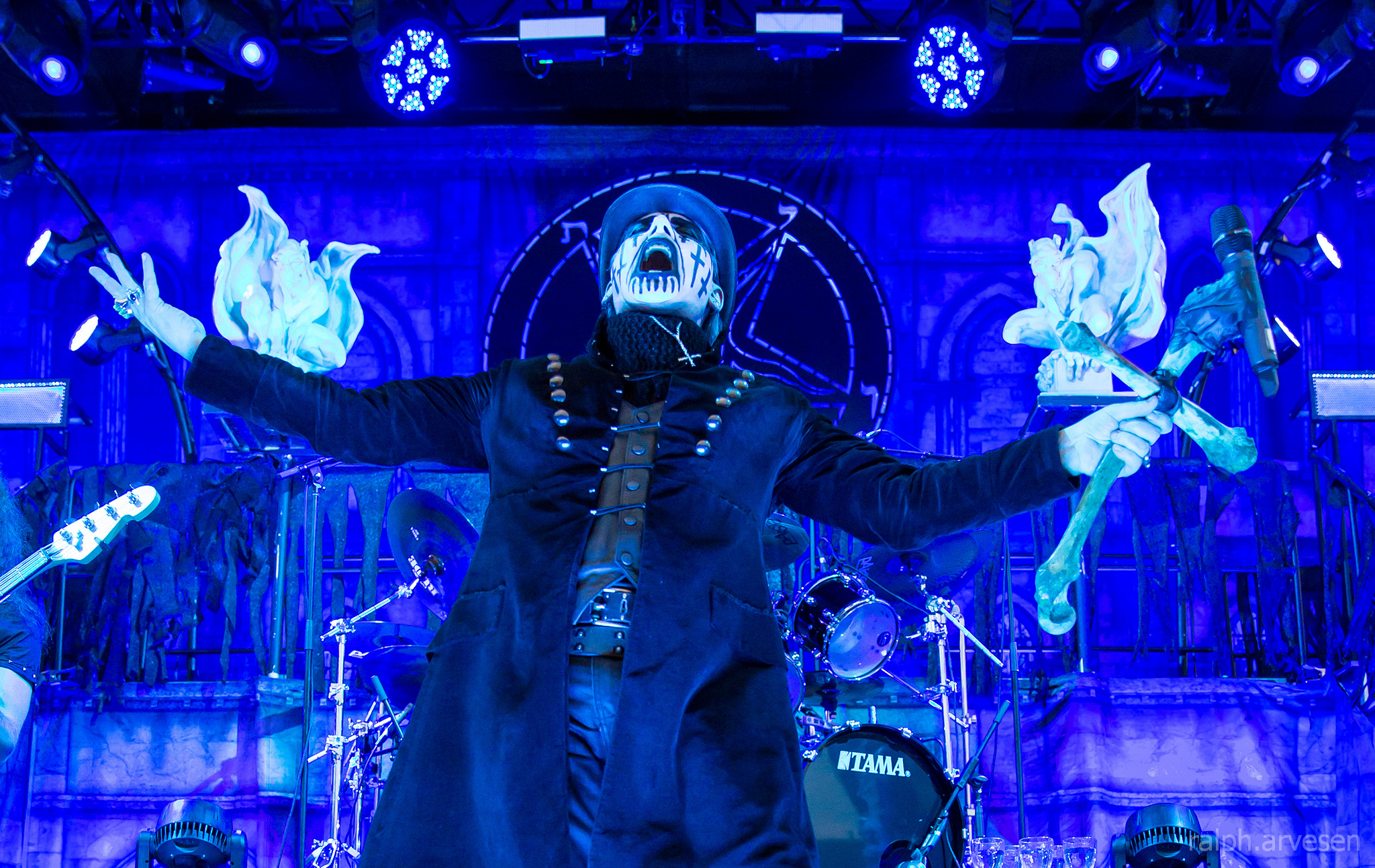 King Diamond no Mayhem Festival (San Antonio, Texas, 2015-07-31)